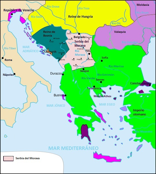 Serbia a finales del reinado del Príncipe Lazar